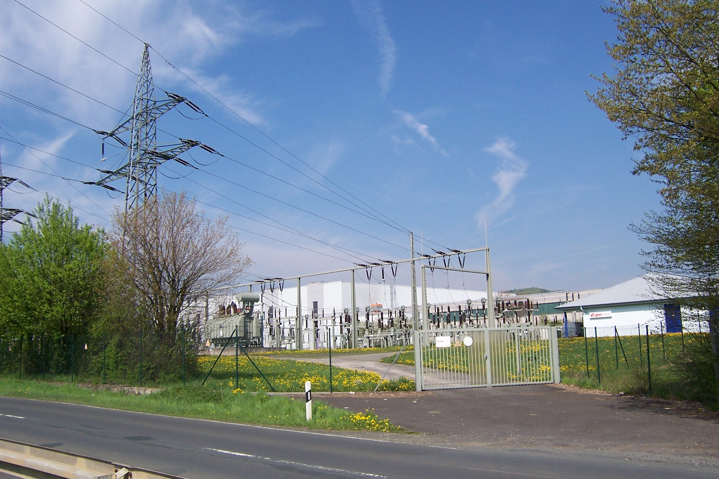 Umspannwerk (110 kV) in Dautphetal-Friedensdorf